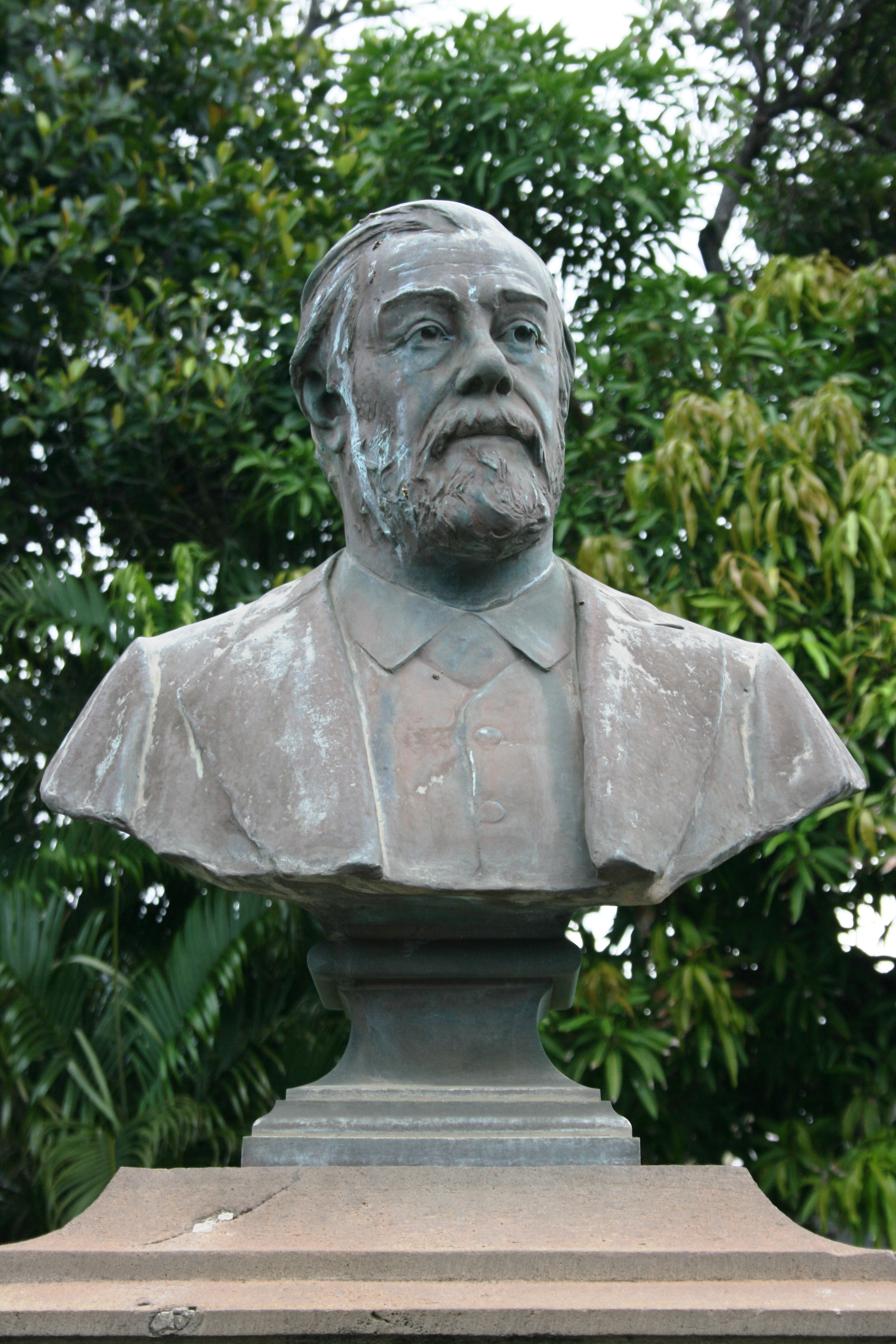 Buste d'Alexandre Robinet de La Serve dans la cour du palais Rontaunay à Saint-Denis de La Réunion.